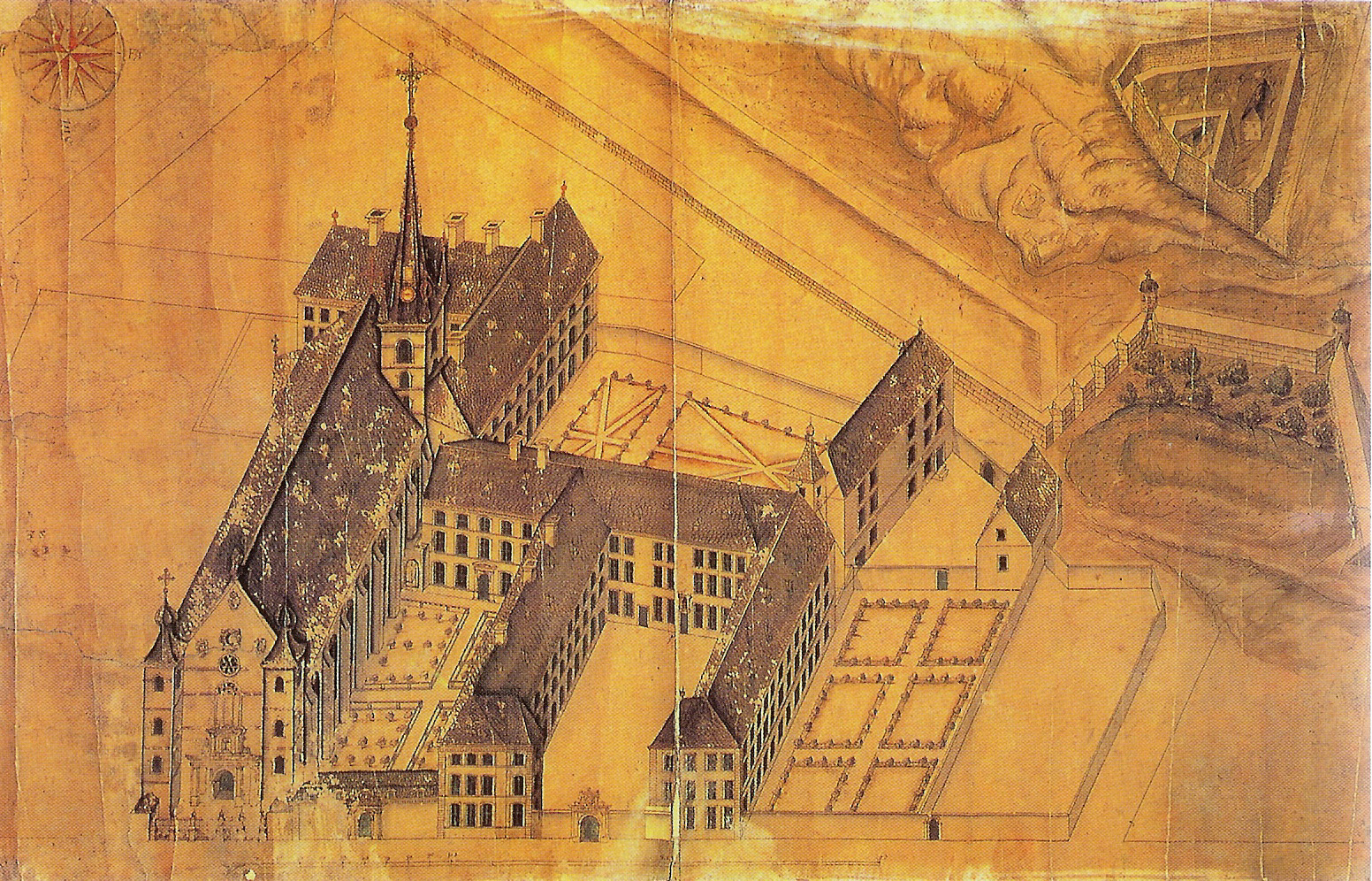 Archtikteplang vun der Jesuitekierch an dem Jesuitekolléisch aus der Stad Lëtzebuerg (ëm 1686) - Bibliothèque royale Albert 1ier, Bruxelles